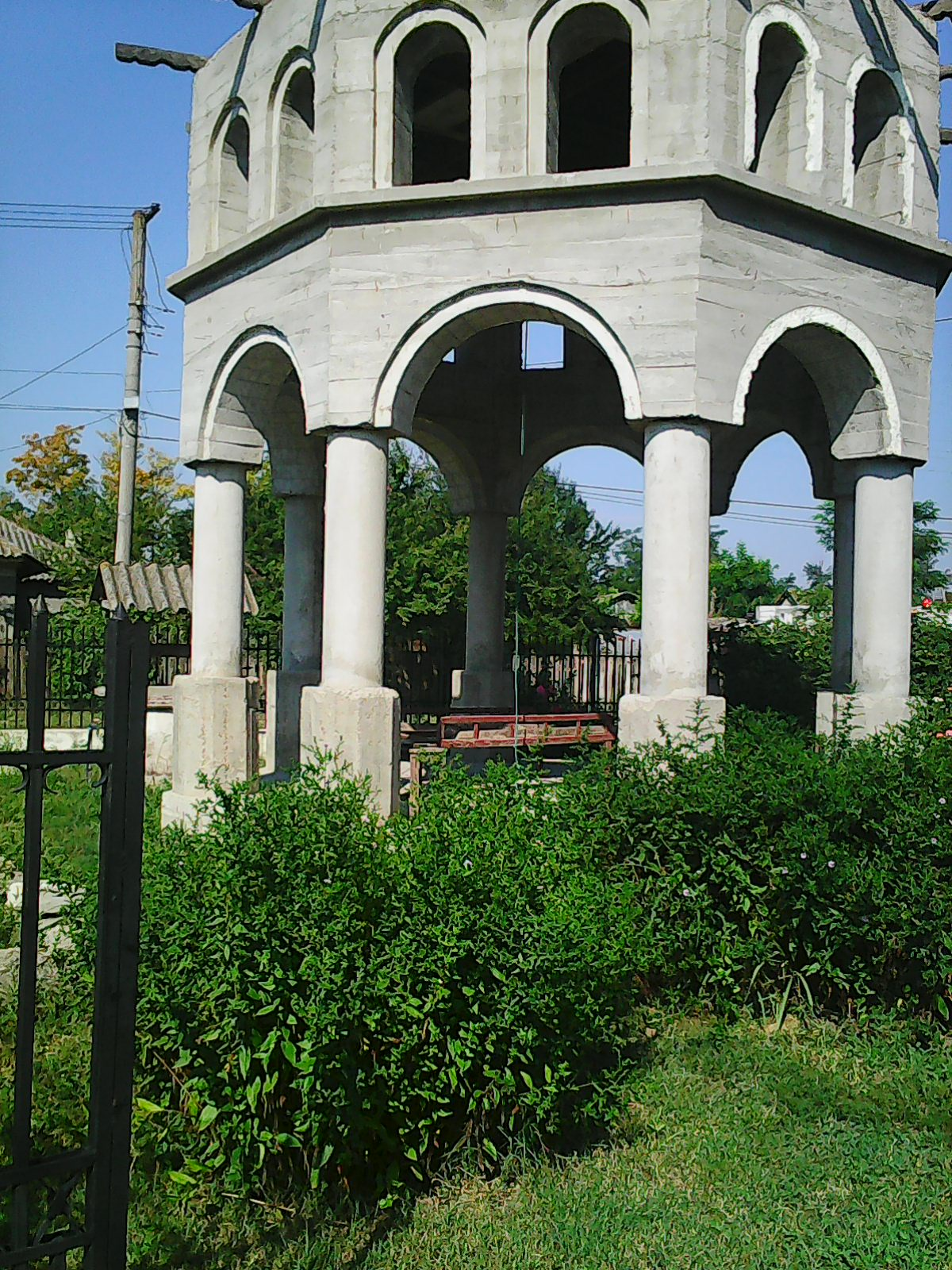 Biserica "Sfantul Ierarh Nicolae" din Rasa, construita intre 1936-1937 pe acelasi amplasament cu o biserica mai veche, din secolul XIX, de la care a preluat catapeteasma.